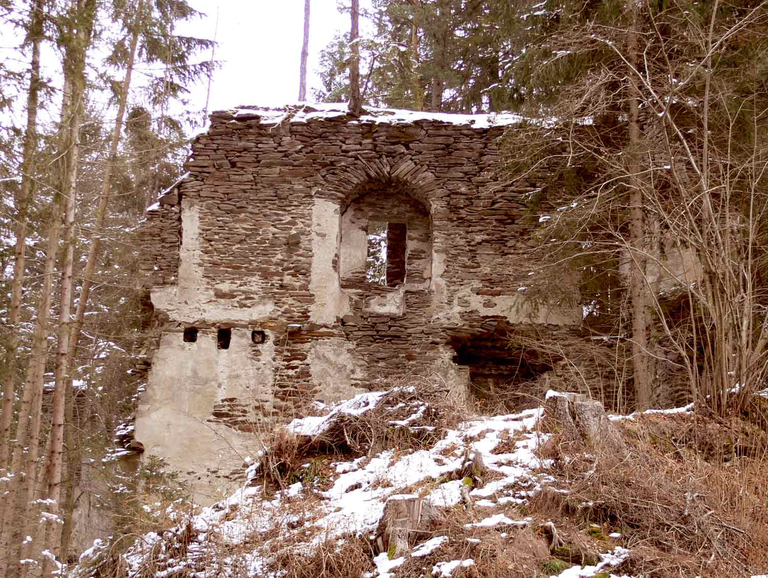 Burgruine Neu- Leonrod (Neu- Leonroth), Innenseite des Wohnturms